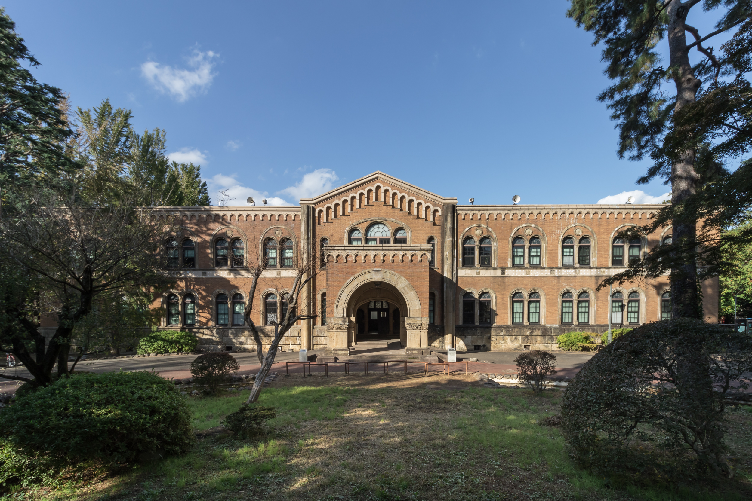 一橋大学 国立キャンパス東本館（旧東京商科大学商学専門部）。登録有形文化財。